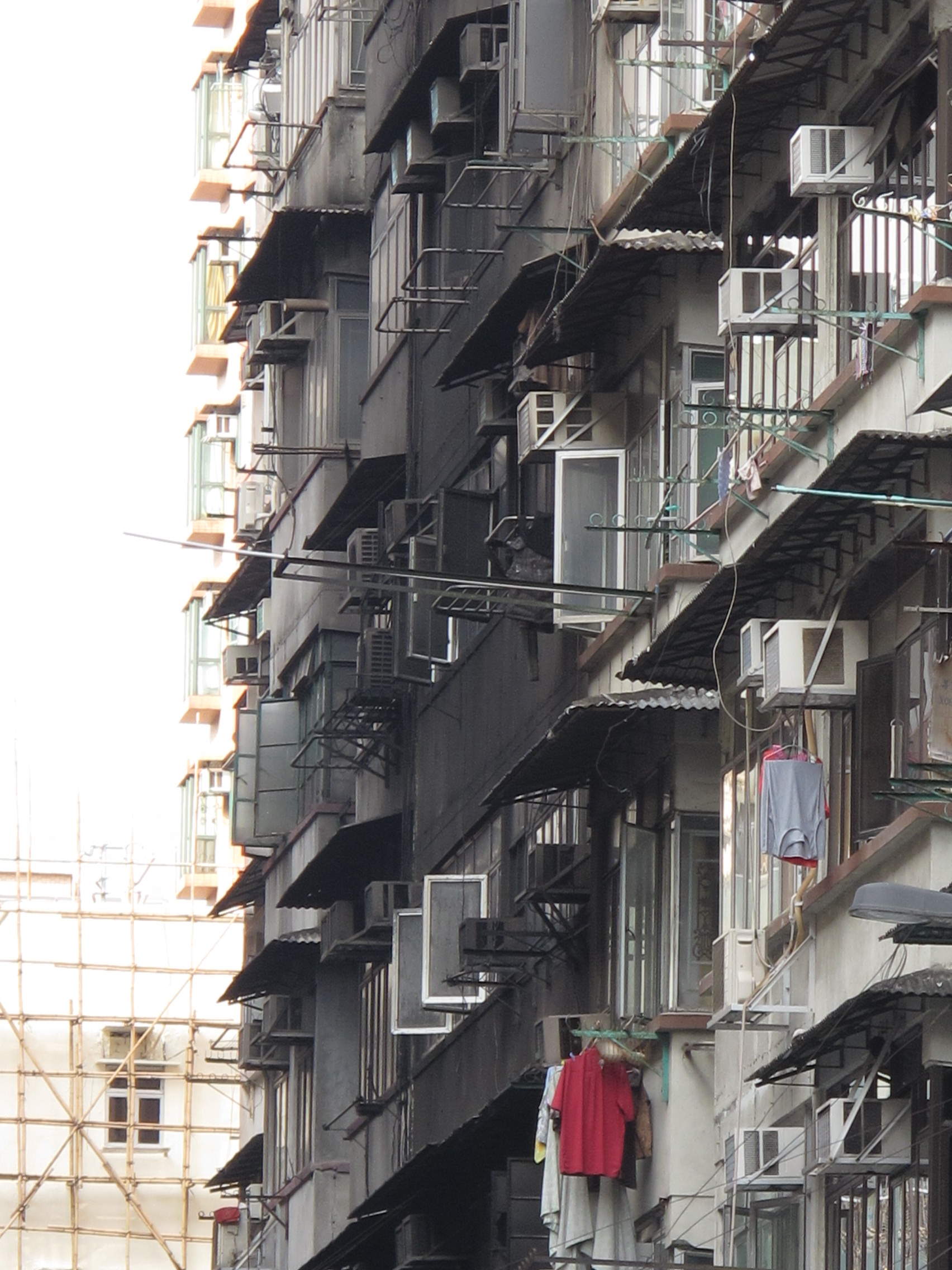 2011 Fa Yuen Street Fire